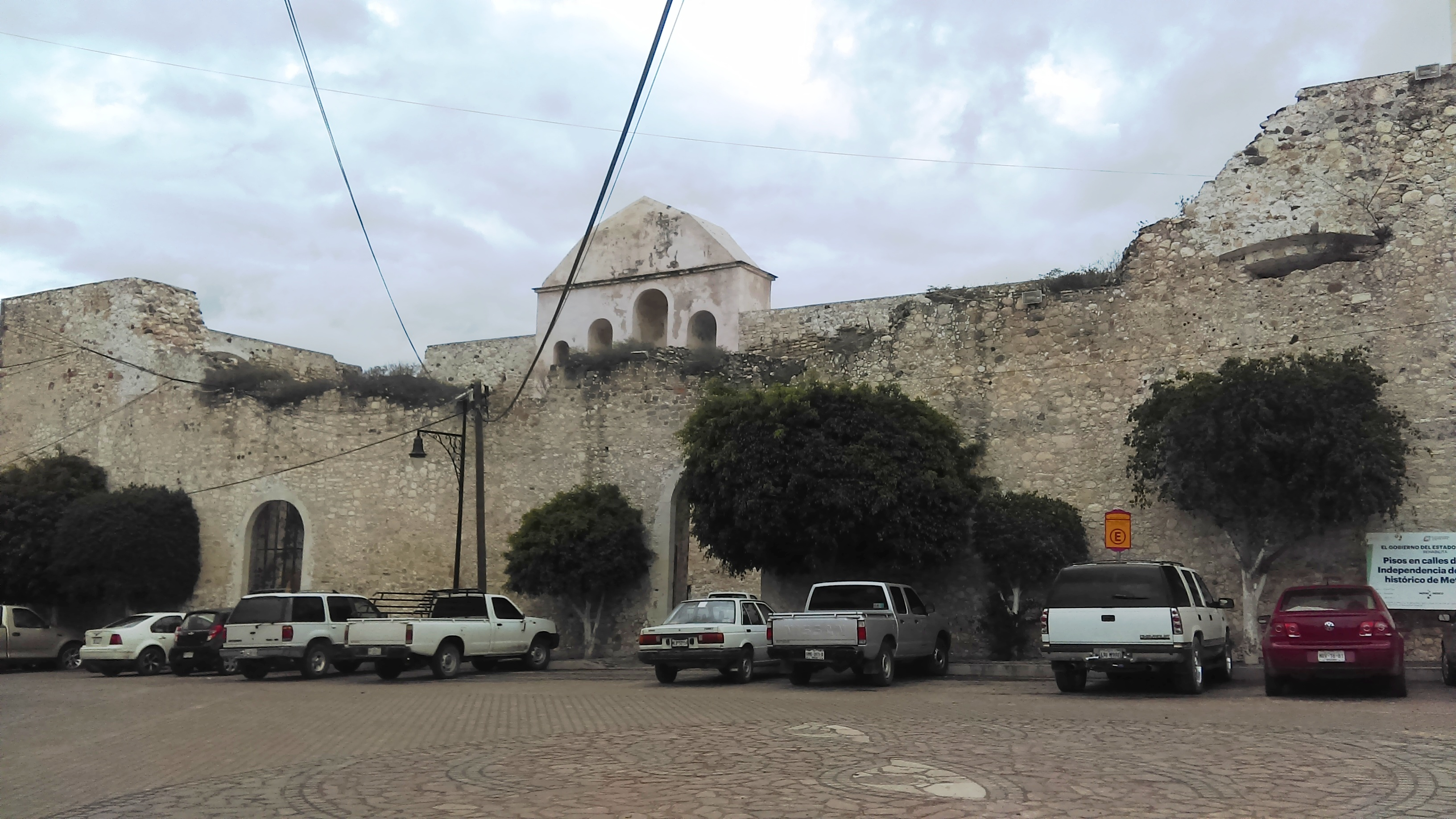 Edifico La Comunidad en Metztitlán, Hidalgo, México.